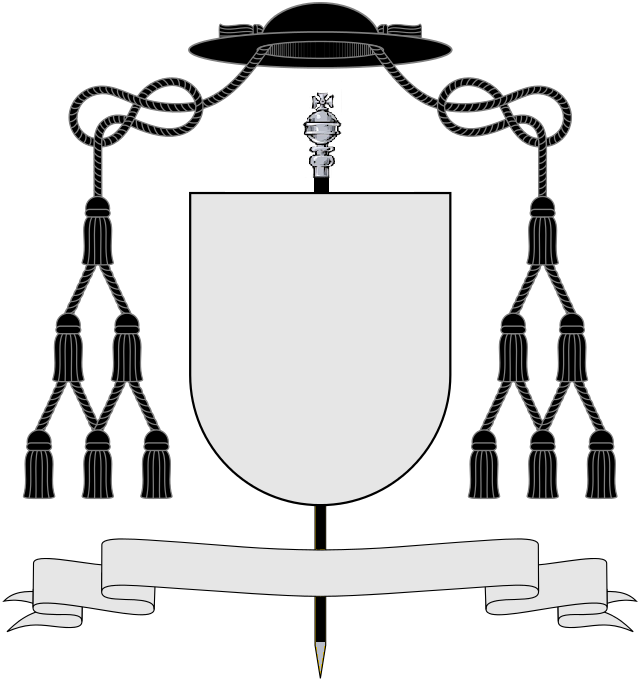 Stemma da prevosto capo di una pieve con ferula argentea